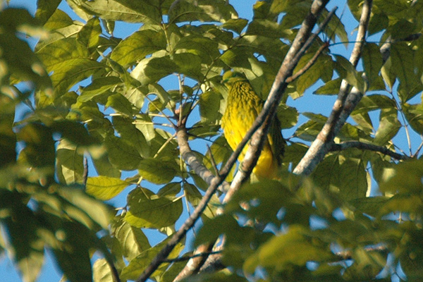 Male Golden Dove (Ptilinopus luteovirens)